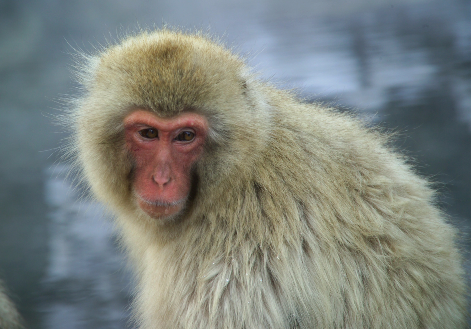 Japanese macaque Macaca fuscata Jigokudani Onsen, Yamanouchi, Nagano Prefecture, Japan